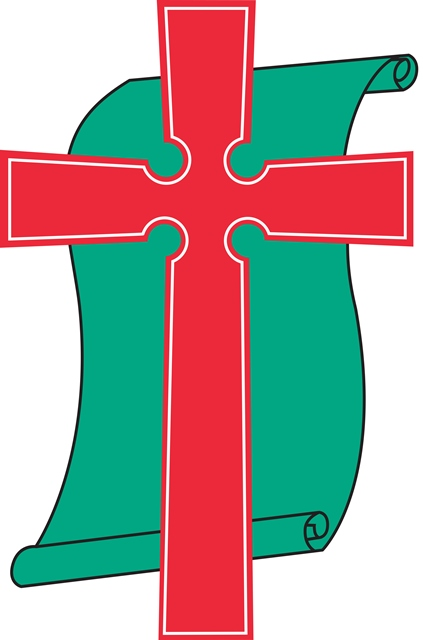 대한예수교장로회(통합) 로고. 1986년 총회에서 공식 채택되었다.